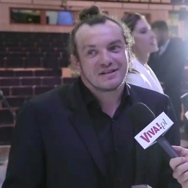 Łukasz Palkowski, reżyser i scenarzysta.